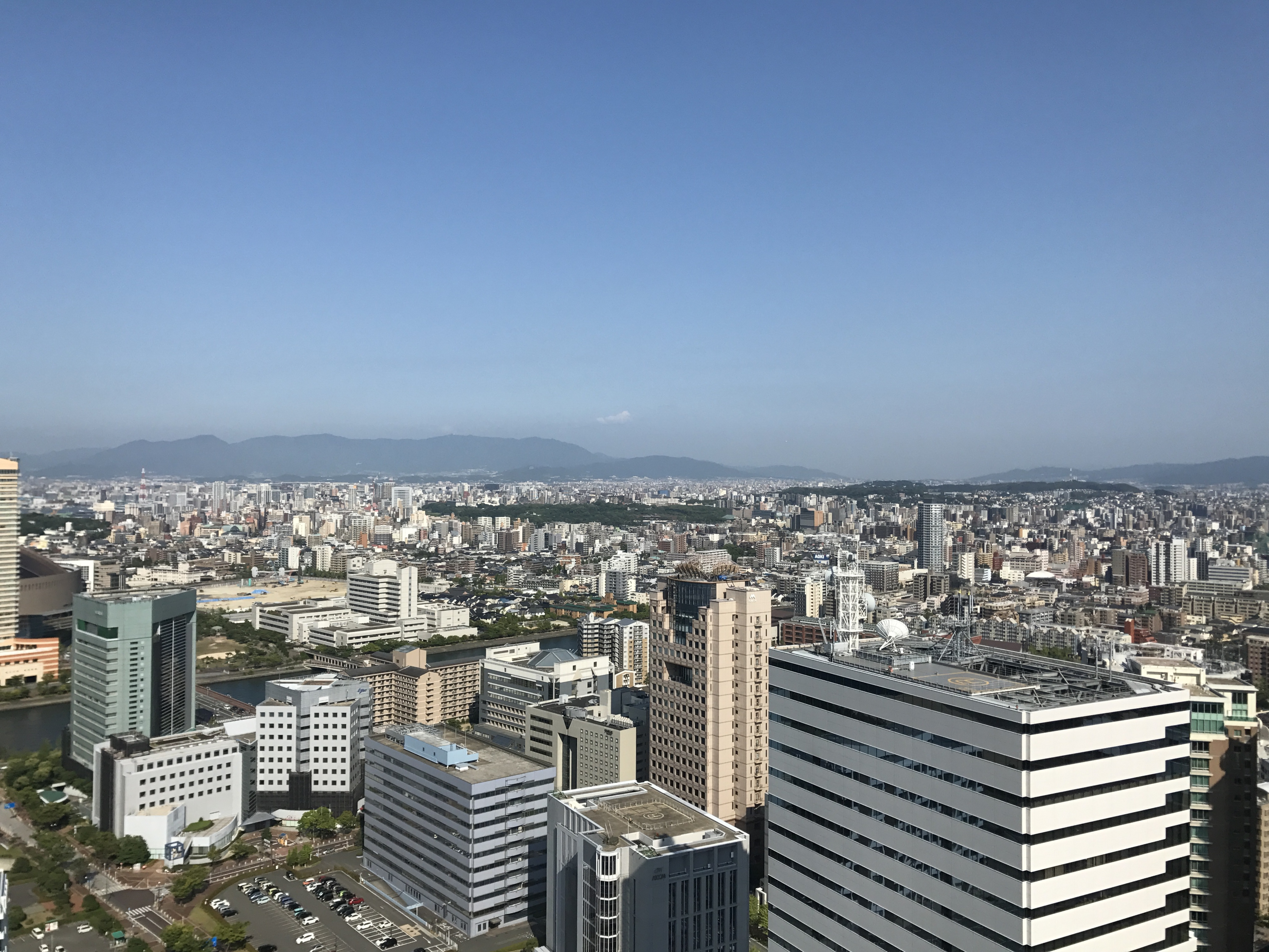 福岡タワーより望む福岡市内